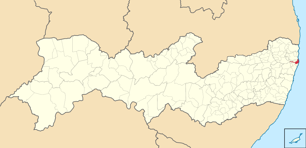 Mapa de Paulista (PE) (2)